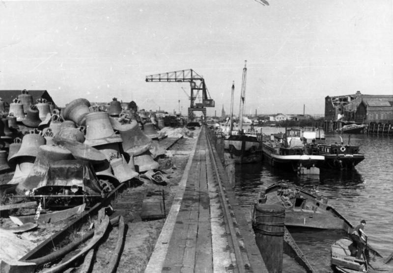 Illus-dpd Glocken im Hamburger Freihafen 544-47